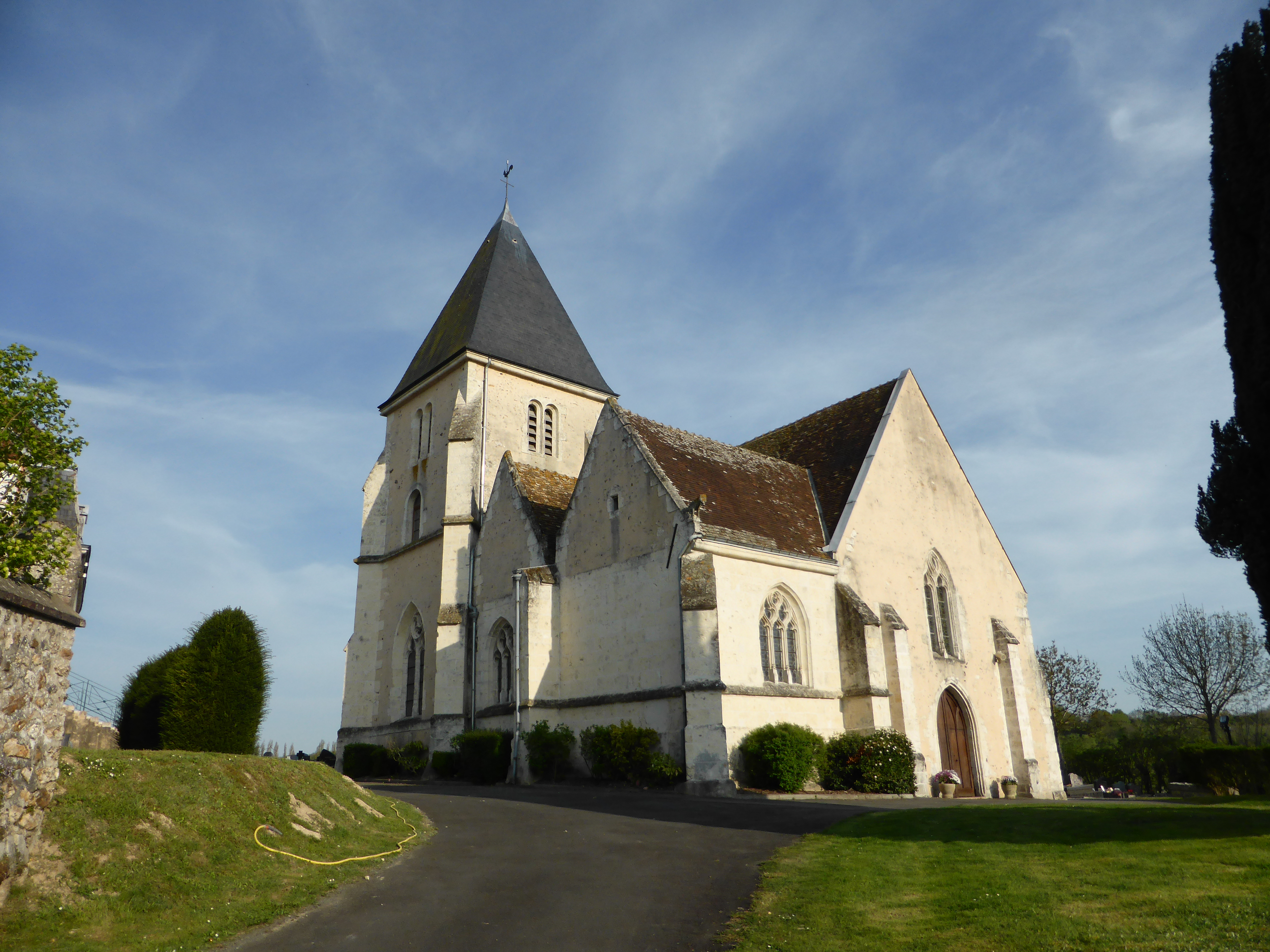 Église Notre-Dame-du-Mont-Carmel de Margon, en Eure-et-Loir.